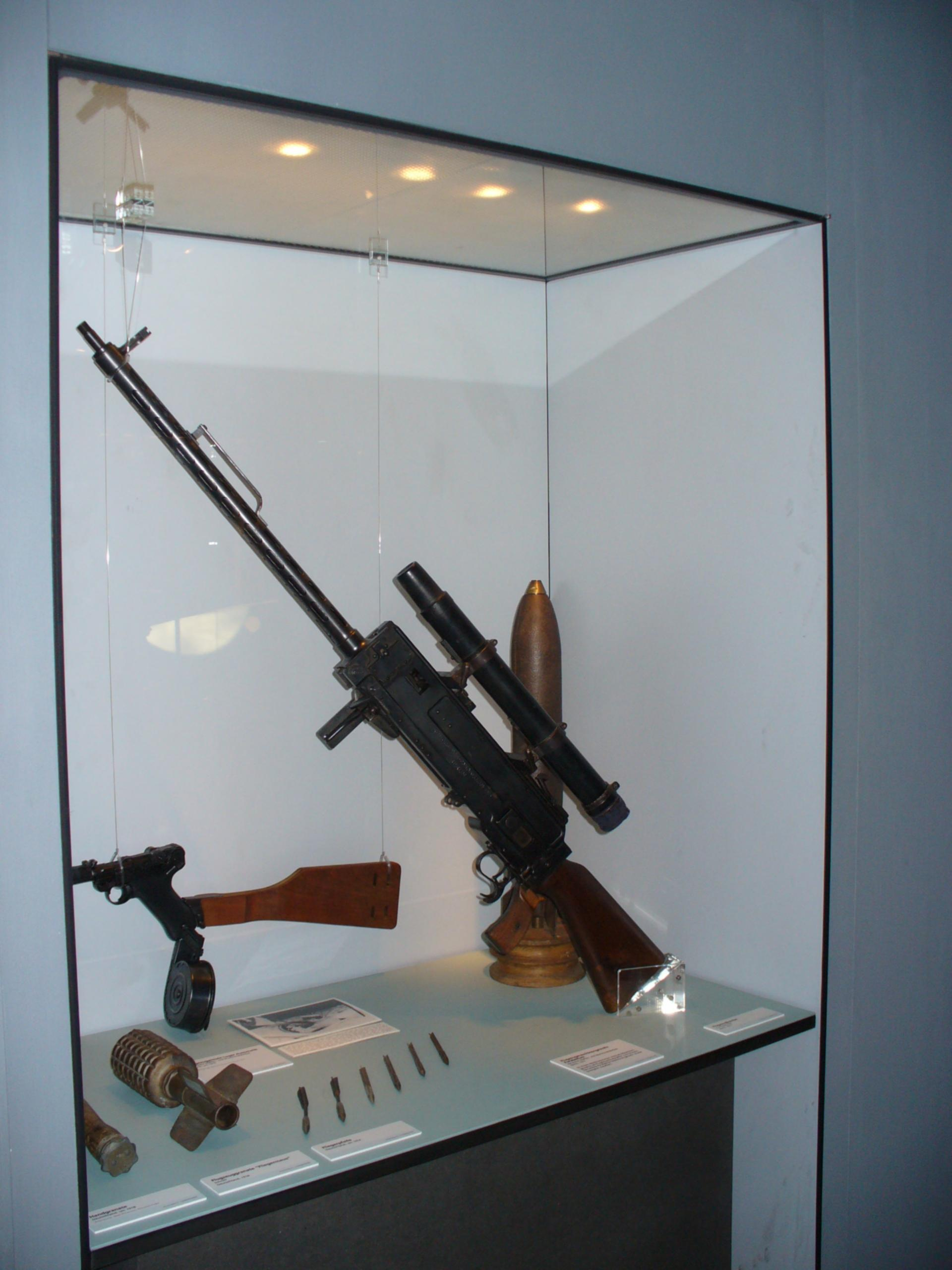 Flugzeug-Maschinengewehr Parabellum LMG 14/17, German aircraft machine gun, 1st World War